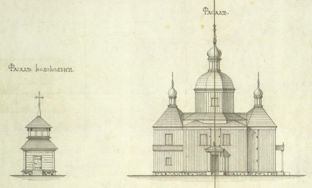 Беларуская (тарашкевіца): Баславічы (Basłavičy). Царква Сьвятога Сымона, перанесеная з Слуцку (Słucak)